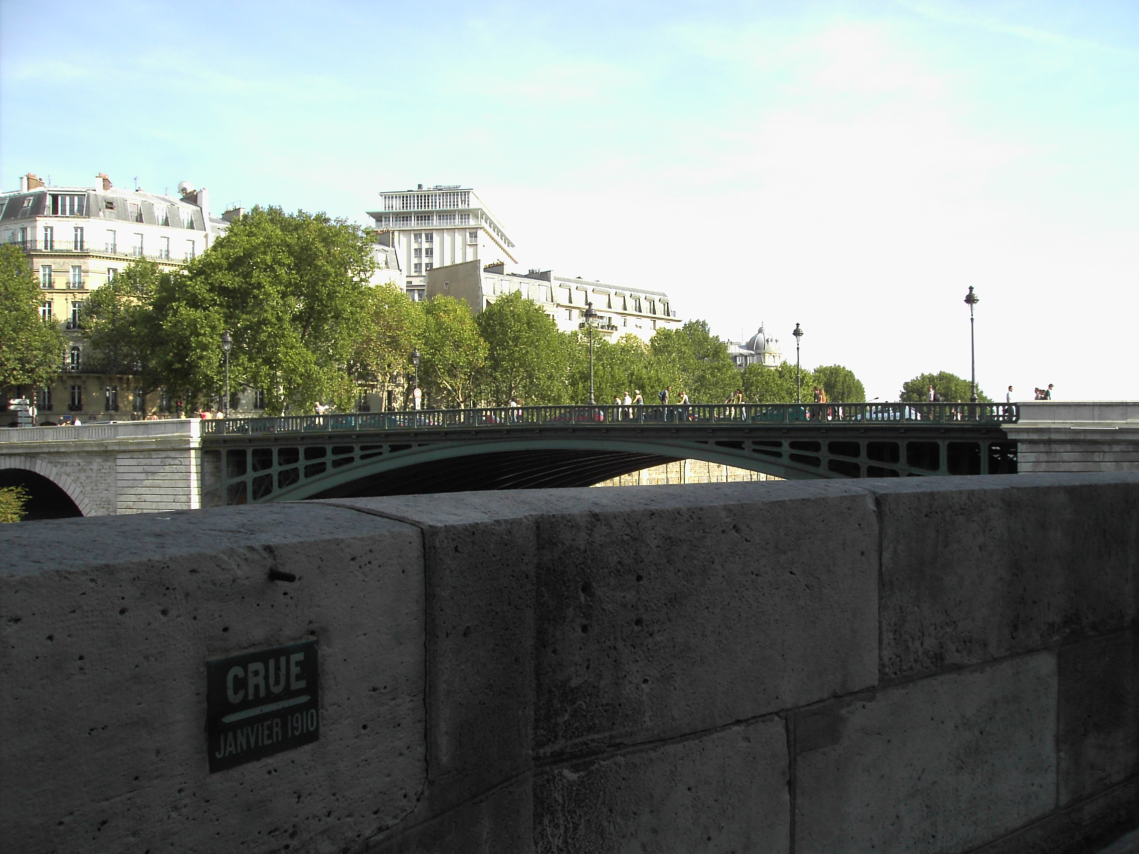 Paris, Quai d'Anjou: la crue de la Seine 1910 by Lalupa